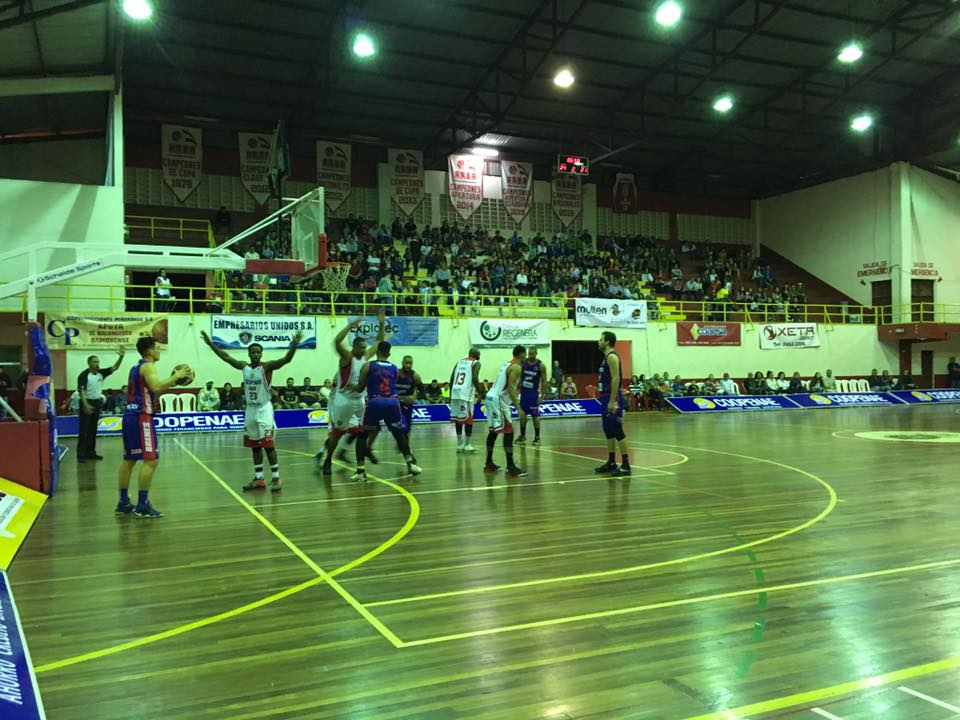 Partido entre Coopenae ARBA San Ramón y Ferretería Brenes Barva en el gimnasio Rafael Rodríguez en la ciudad de San Ramón. Celebrado el 7 de abril del 2017. Marcador final: San Ramón 72 - 59 Barva.